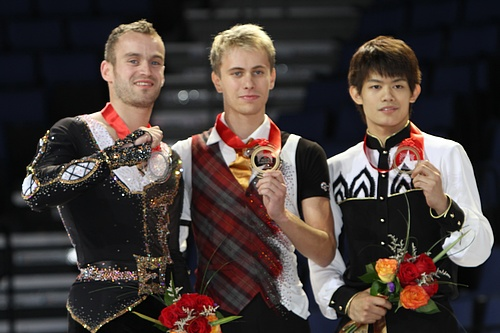 Подиум в мужском одиночном катании на турнире 2011 Skate America. Слева на право: Кевин ван дер Перрен, Михал Бржезина, Такахико Кодзука